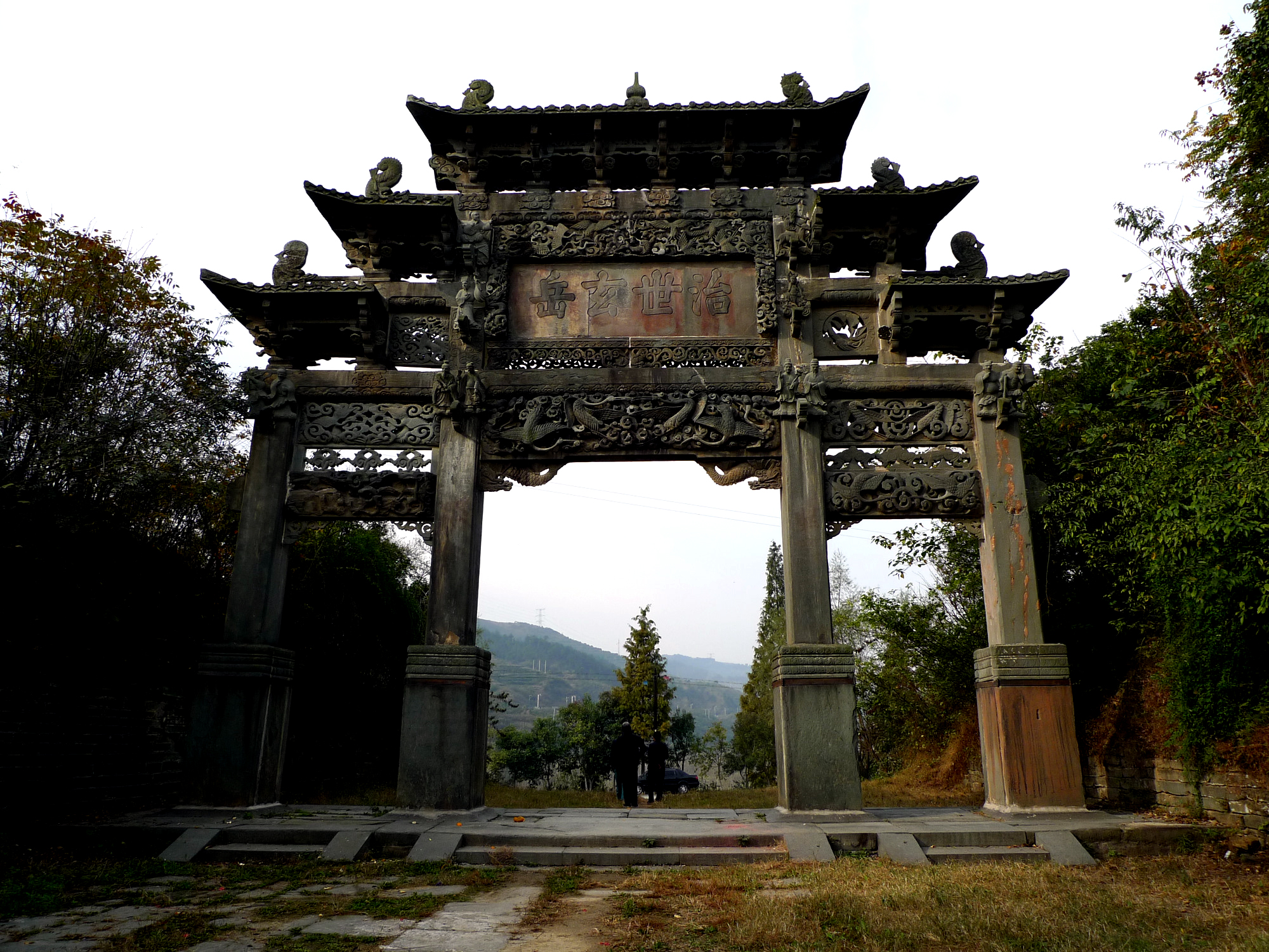 武当山玄武门